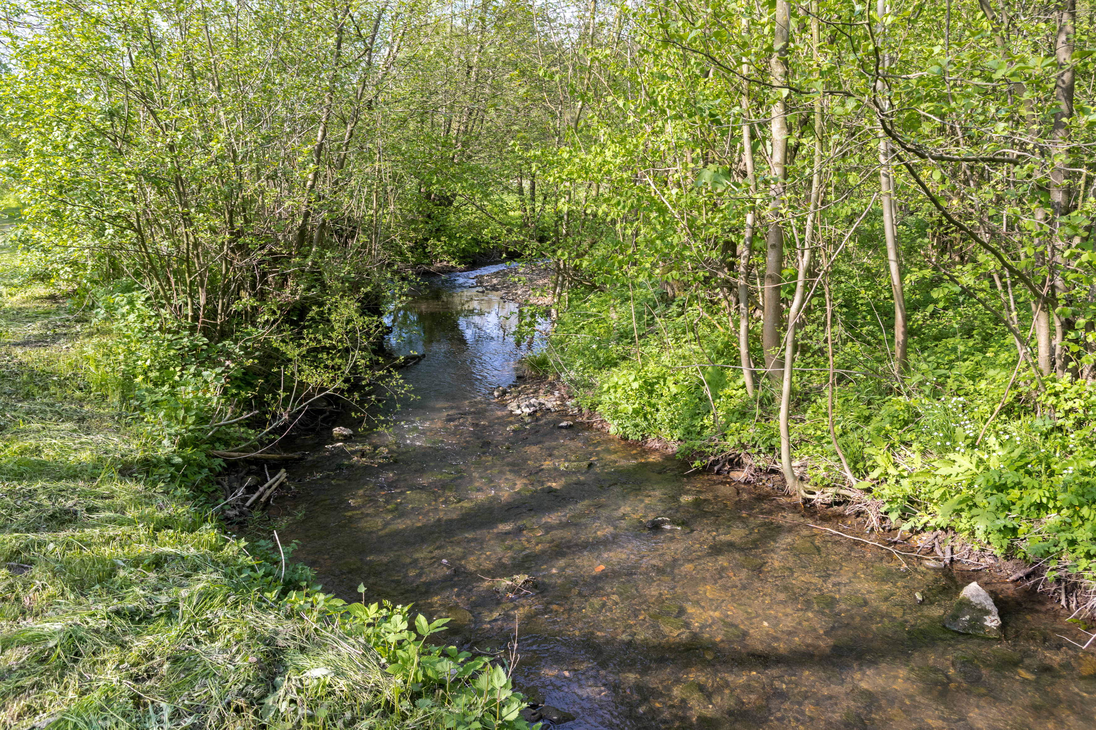 Silberbach im Naturschutzgebiet Silberbachtal mit Ziegenberg, Horn-Bad Meinberg, Kreis Lippe